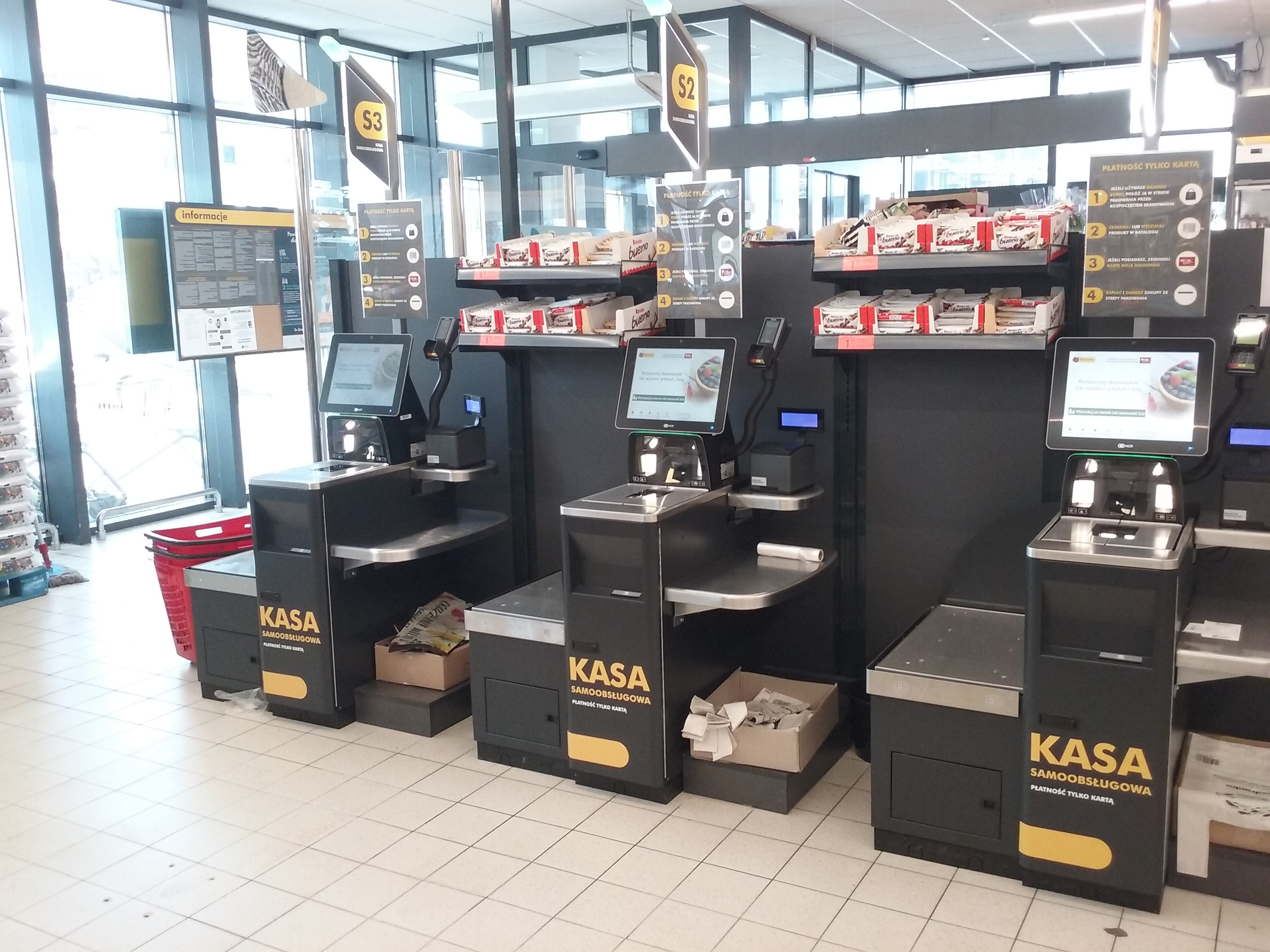 Kasy samoobsługowe w sklepie portugalskiej sieci Biedronka w Tomaszowie Mazowieckim